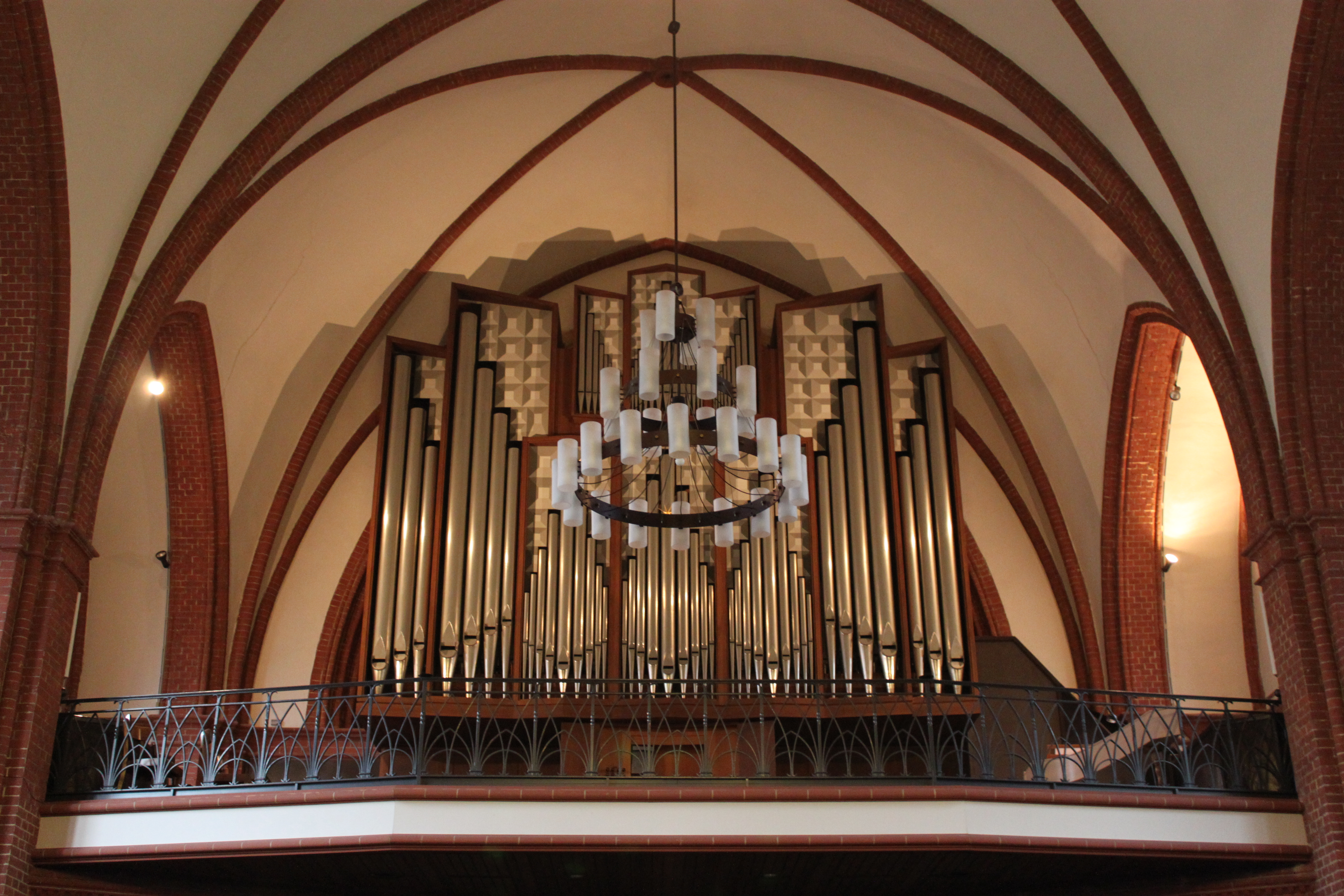 Orgel der Kirche St. Petri in Hamburg-Altona